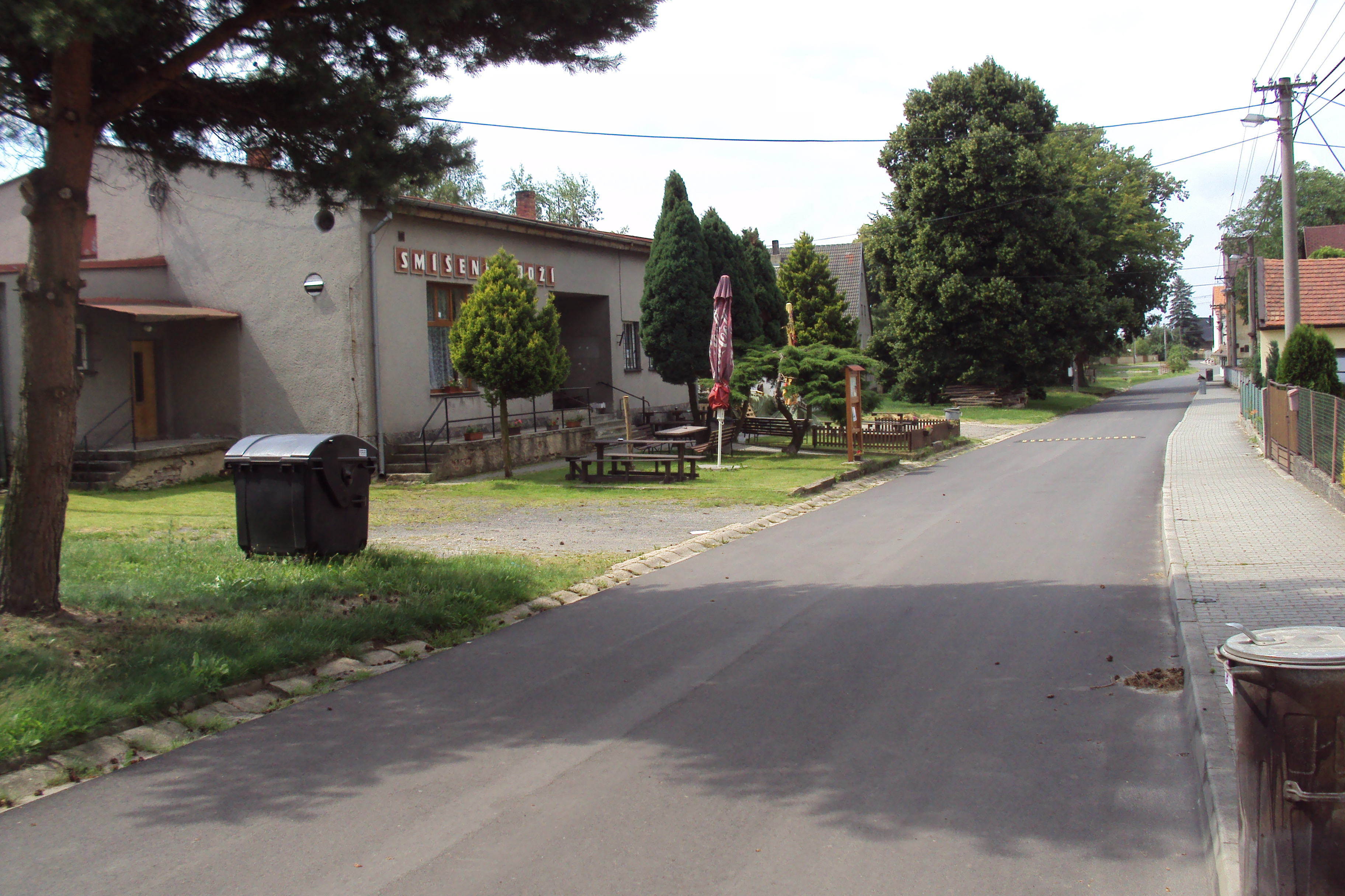 Skalka je ves u Blíževedel